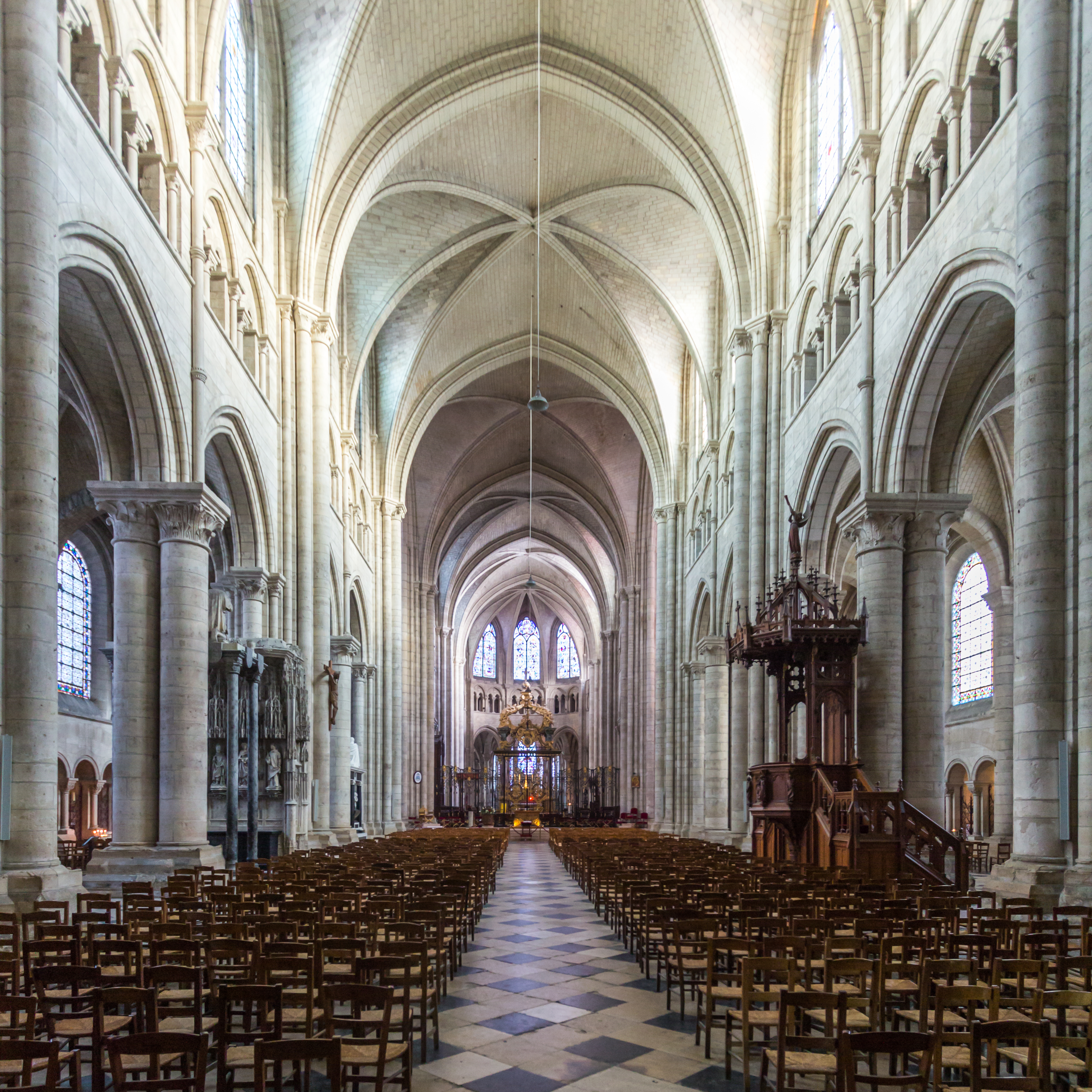 Blick durch das Hauptschiff der Kathedrale von Sens in Richtung Chor